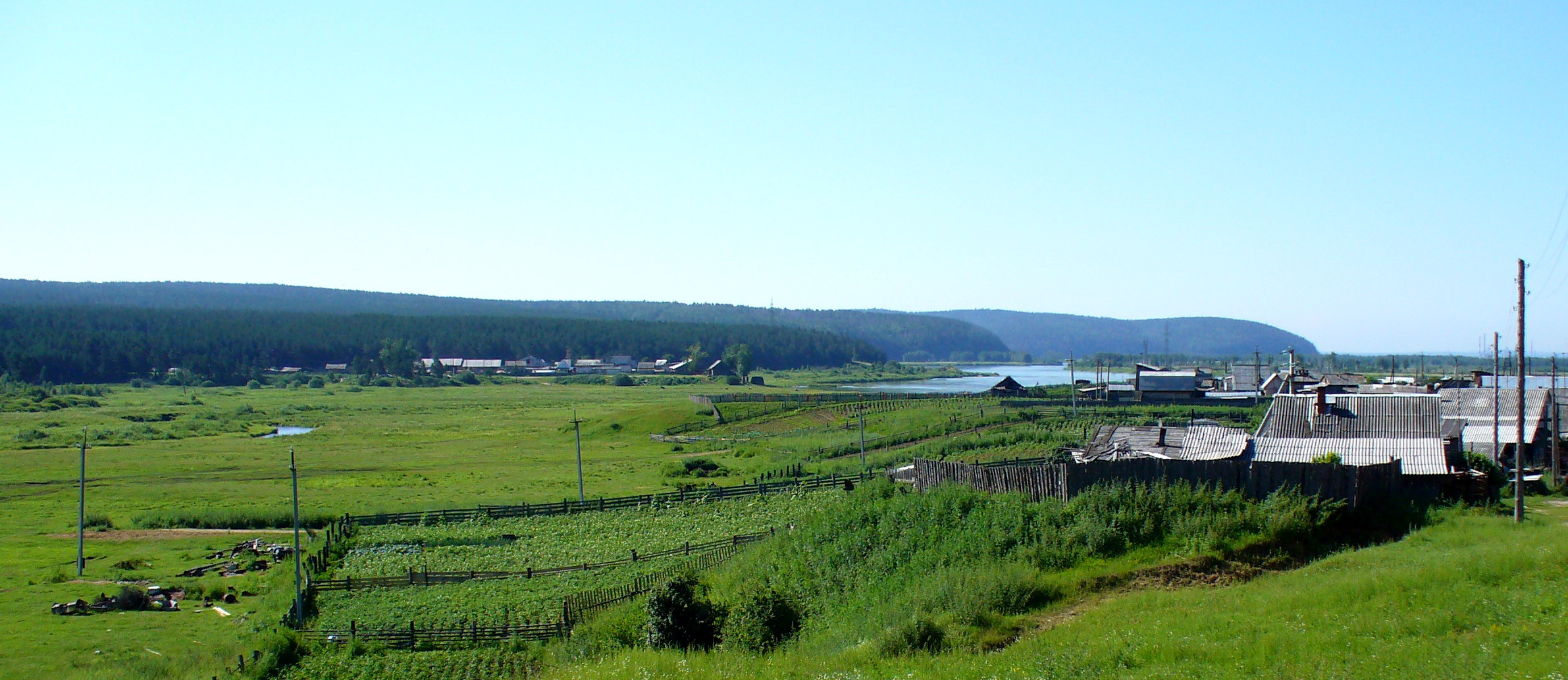 Посёлок Усть-Балей, Иркутская область, Российская Федерация.